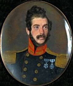 "Ritratto di Enrico Cialdini", tempera su avorio, ridotto e ritoccato